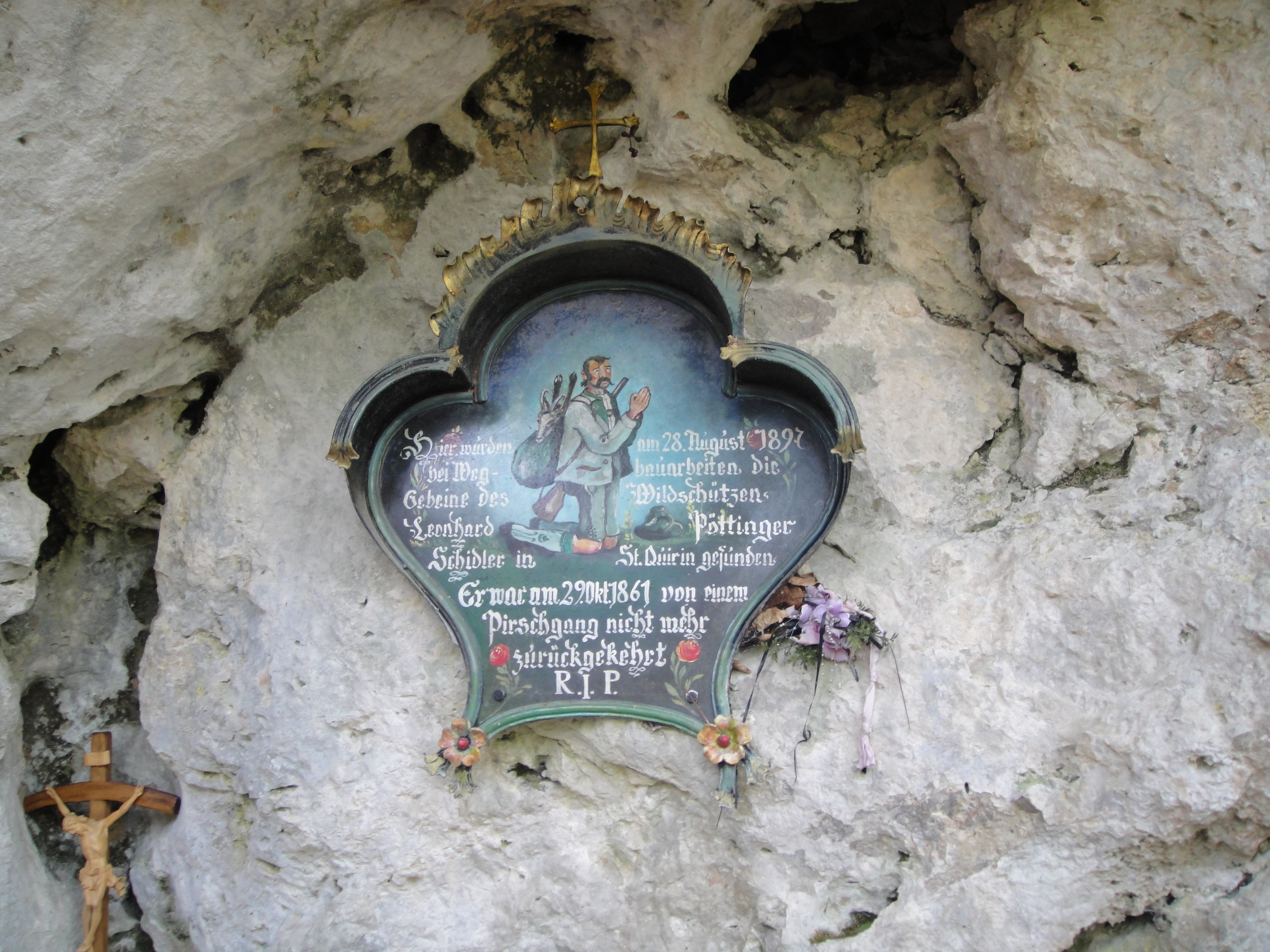 Marterl für den Wilderer Leonhard Pöttinger aus St. Quirin (Gmund am Tegernsee) auf dem Weg zum Riederstein